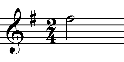 zenei módosítójelek - példák